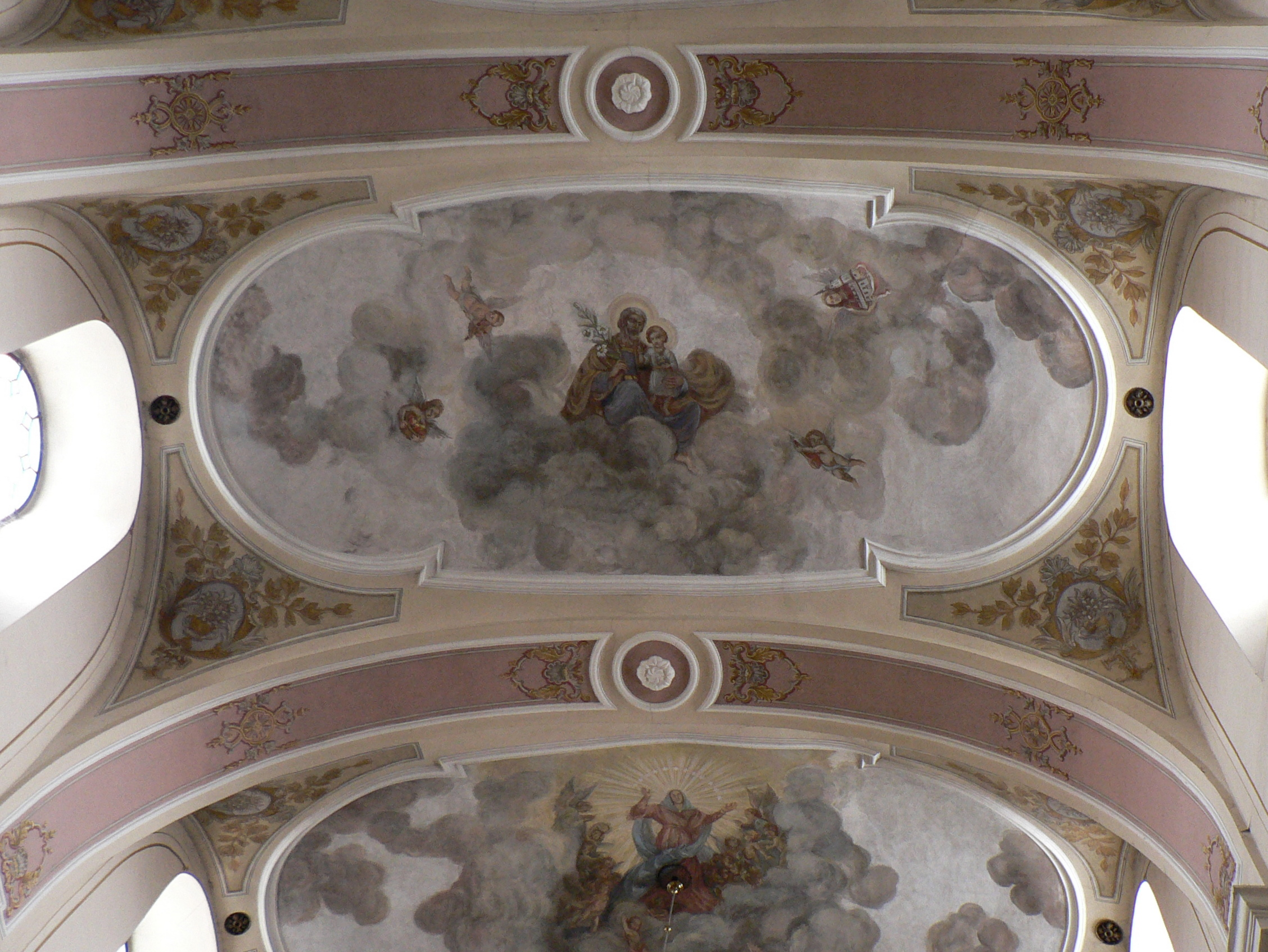 Bazylika kolegiacka Wniebowzięcia NMP w Kaliszu - sklepienie